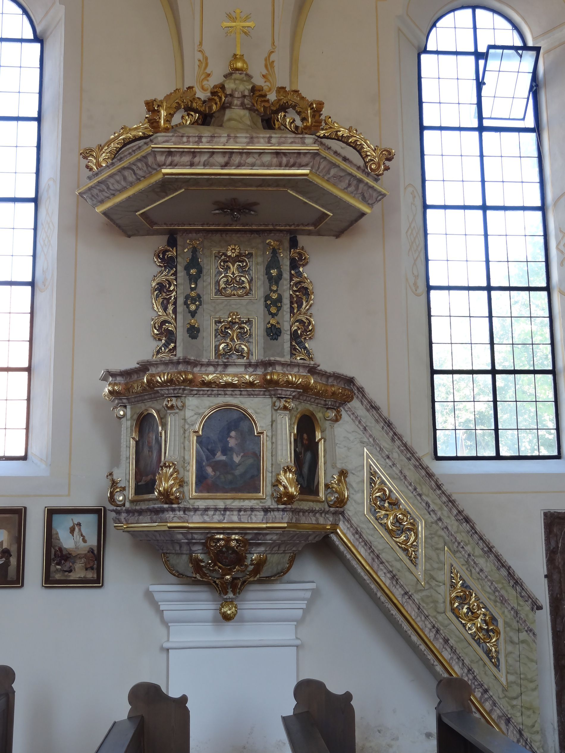 Barocke Kanzel der kath. Pfarrkirche St. Johann Baptist in Binabiburg (Gde. Bodenkirchen, Lkr. Landshut, Bayern)